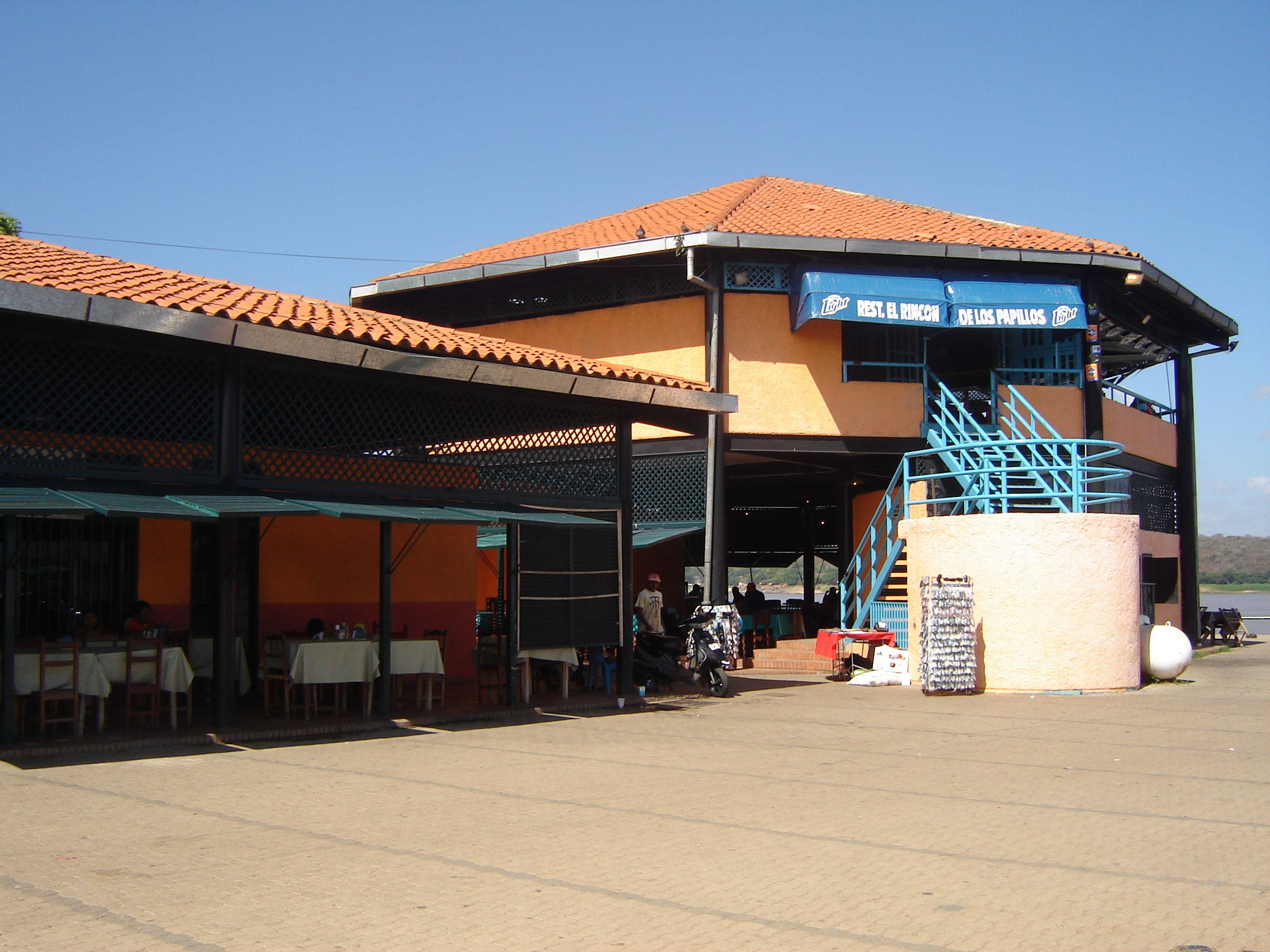 La Carioca public Market